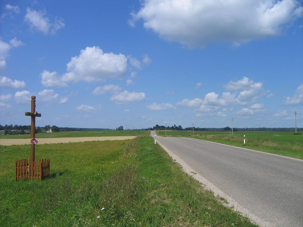 Kalesninkai – kaimas Alytaus rajono Krokialaukio seniūnijoje.